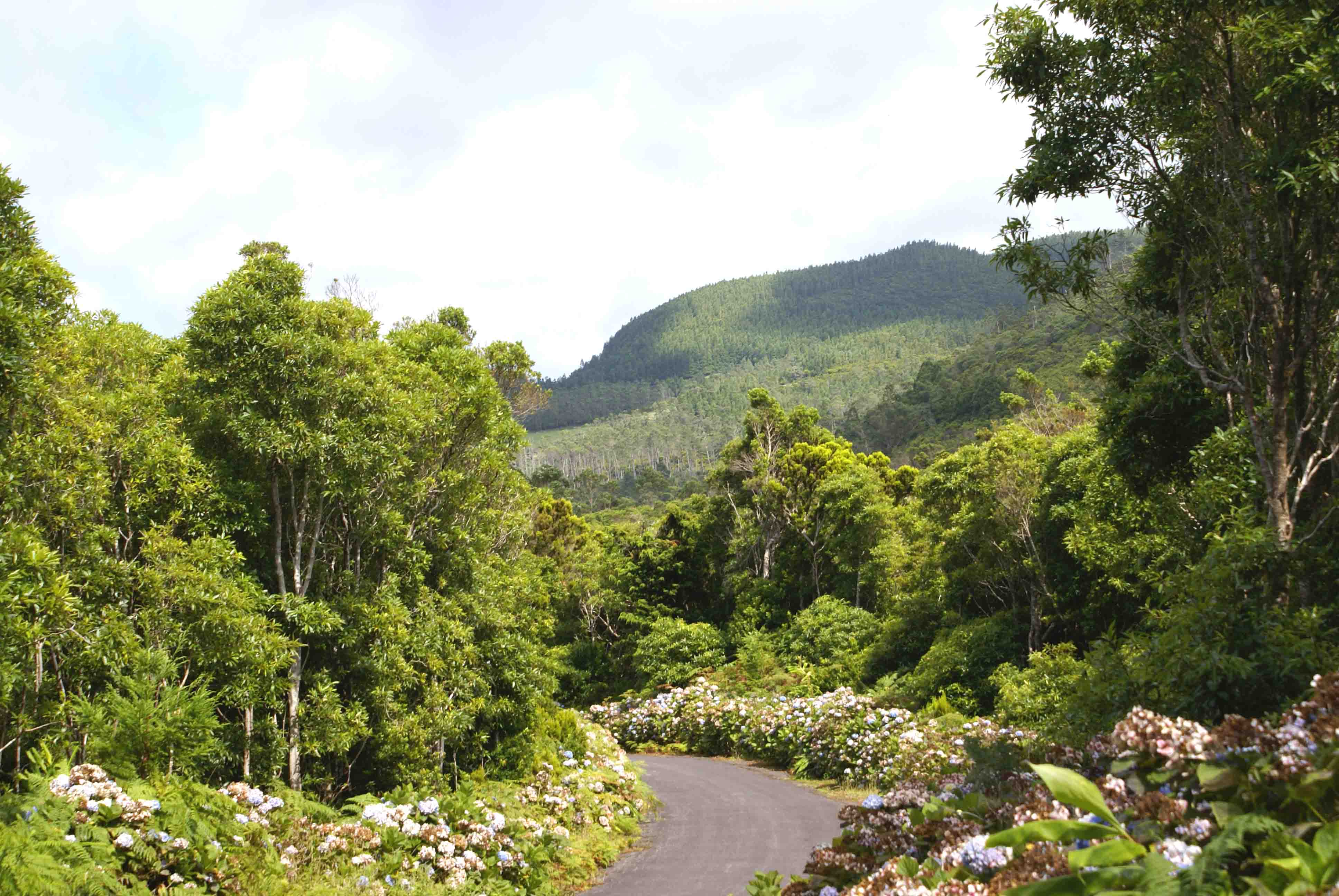 Contrafortes da Serra de Santa Bárbara, ilha Terceira, Açores, Portugal